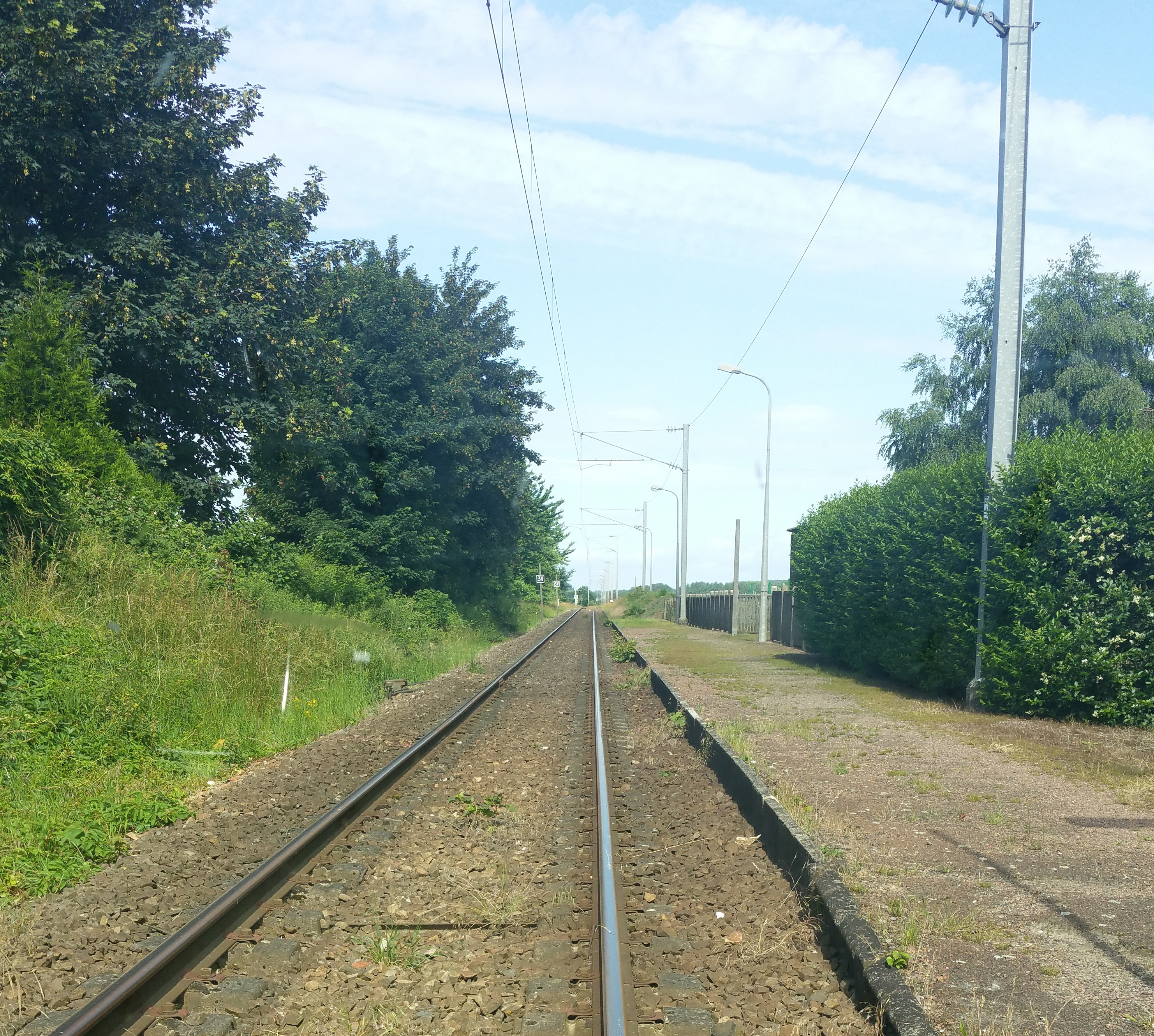 Vue de l'ancienne gare de Fressies.